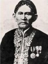 Bupati R.A.A. MARTANEGARA Periode 1893-1918